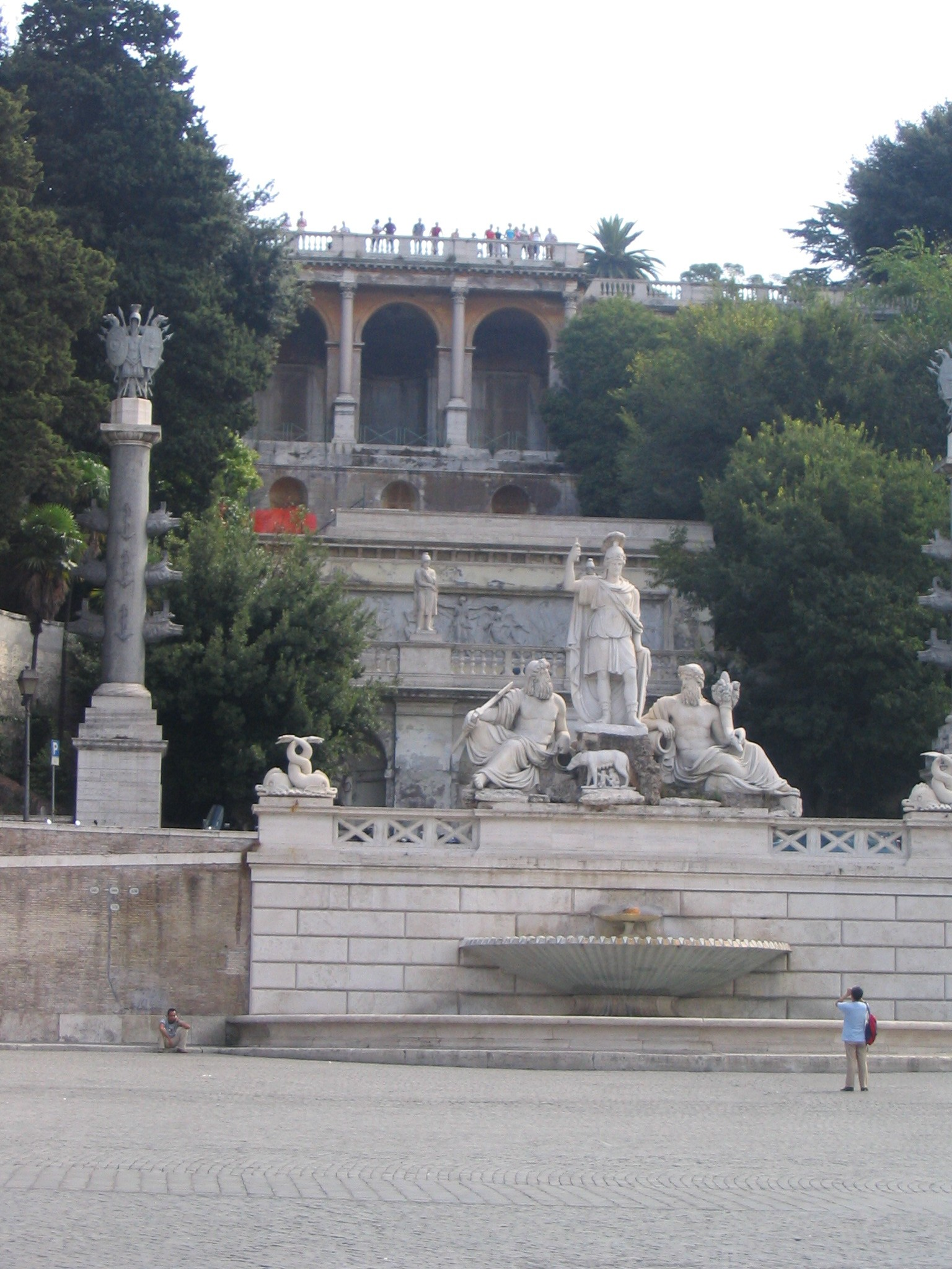 Piazza del Popolo - Rom - Blick auf den Pincio selbst fotografiert am 6.9.2004